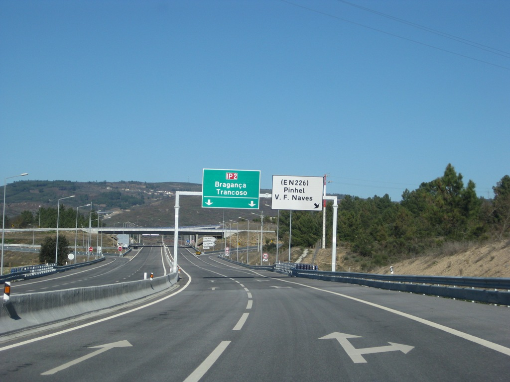 Nó de Vila Franca das Naves no IP2, entre Celorico da Beira e Trancoso, sentido sul-norte